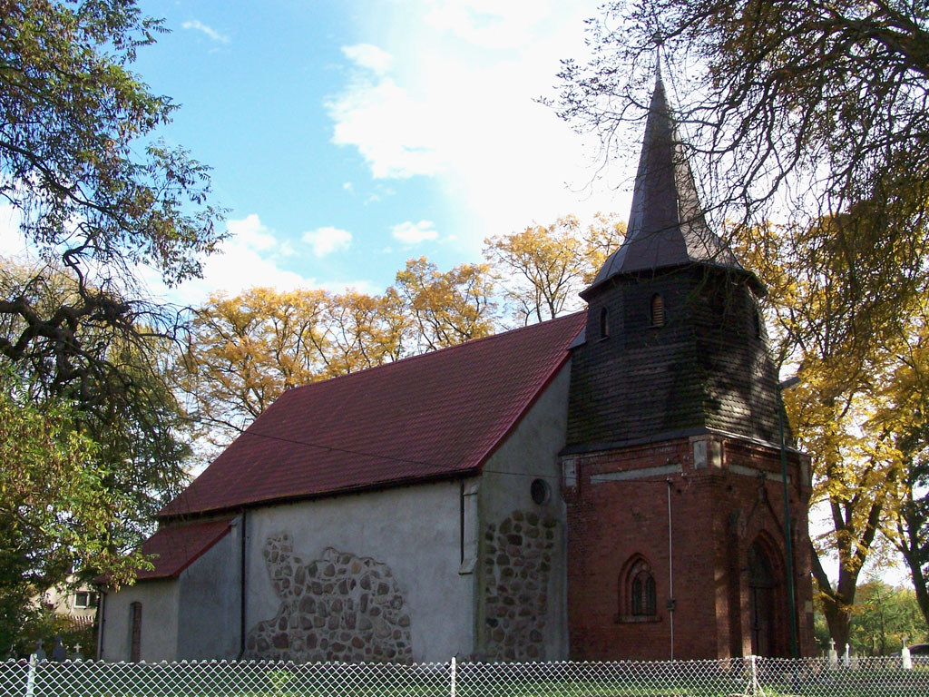 Kościół parafialny pw. Matki Bożej Gromnicznej w Mostach